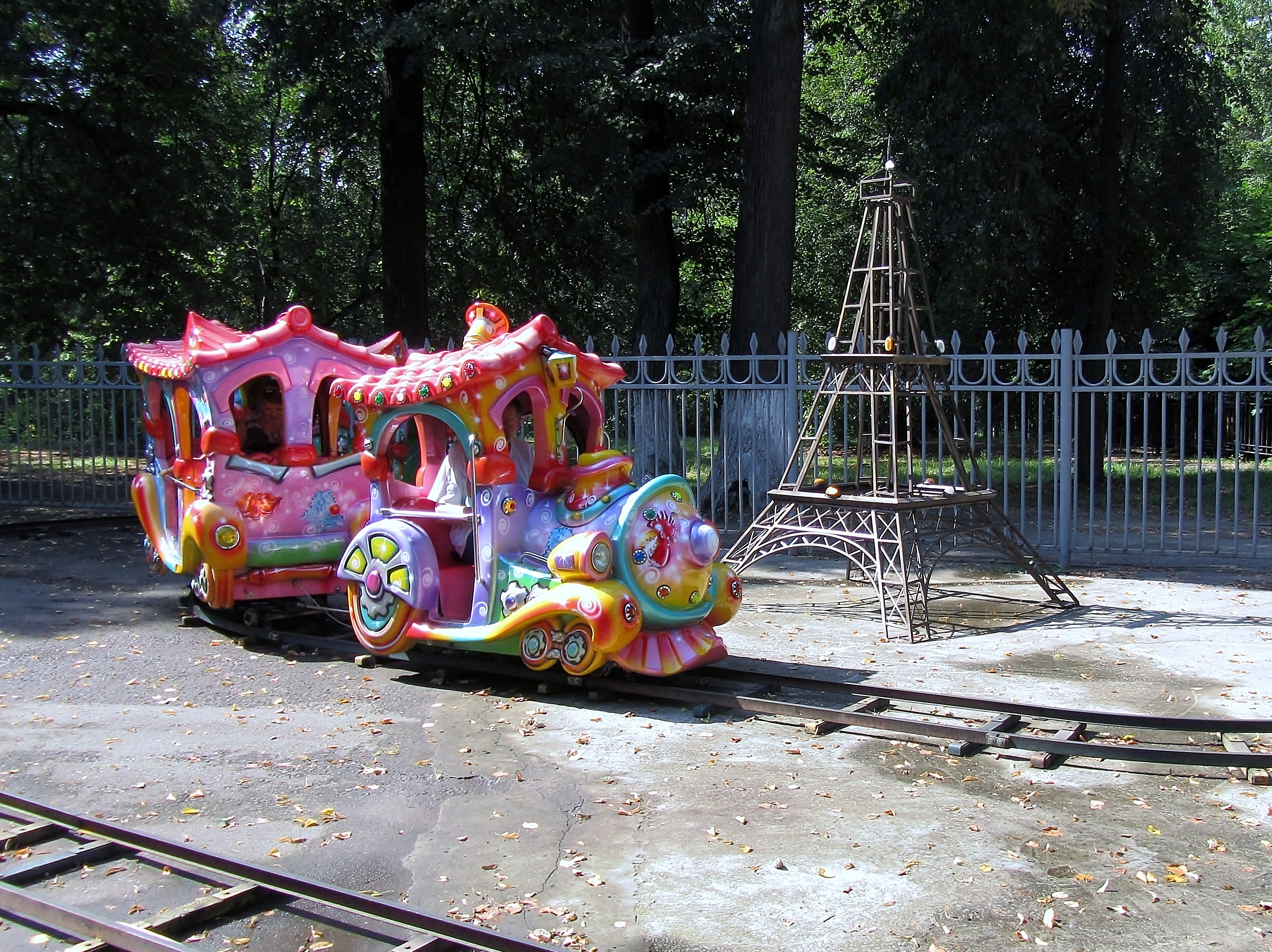 Аттракцион Детский поезд в центральном парке г. Раменское.